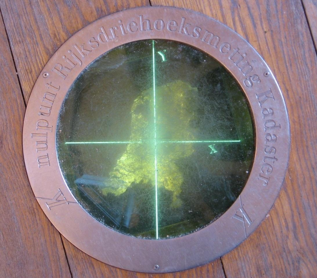 Markering in de vloer van de OLV-toren, recht onder de torenspits, die het nulpunt van het Rijksdriehoekscoordinatenstelsel aangeeft